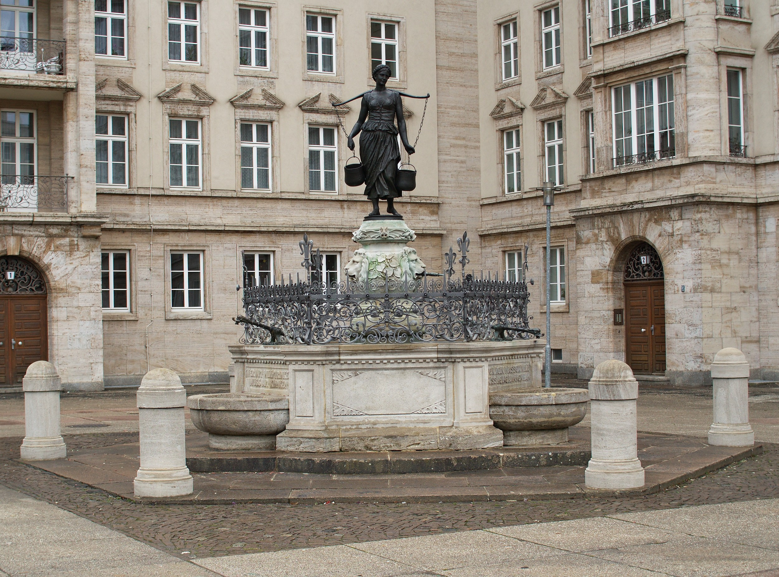 Der Mägdebrunnen, Leipzig 2011.